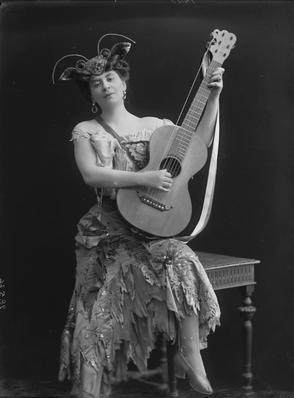 Anita Di Landa fotografata da Mario Nunes Vais